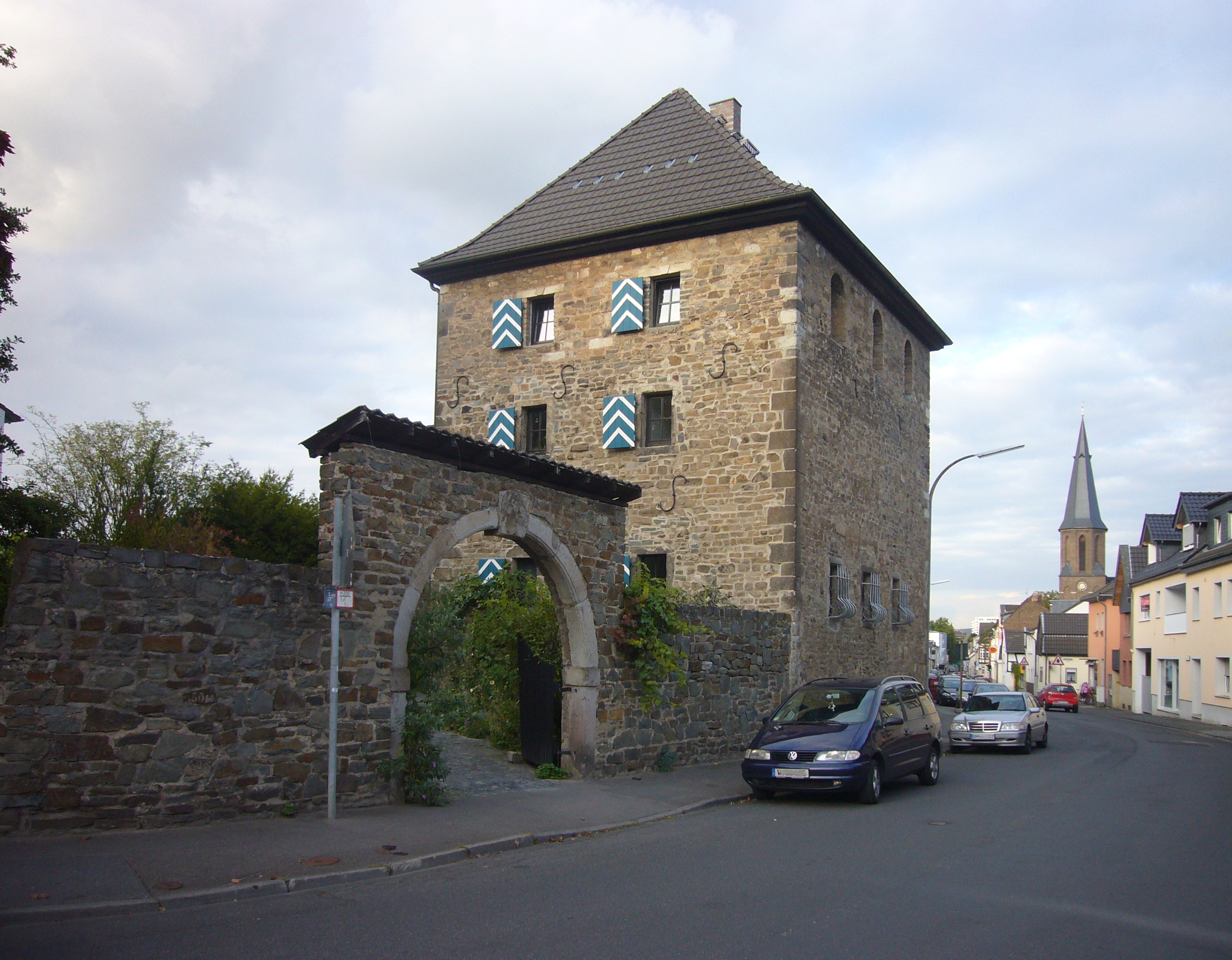 Sogenanntes Turmhaus in der Annaberger Straße 216 in Friesdorf, Bonn-Bad Godesberg